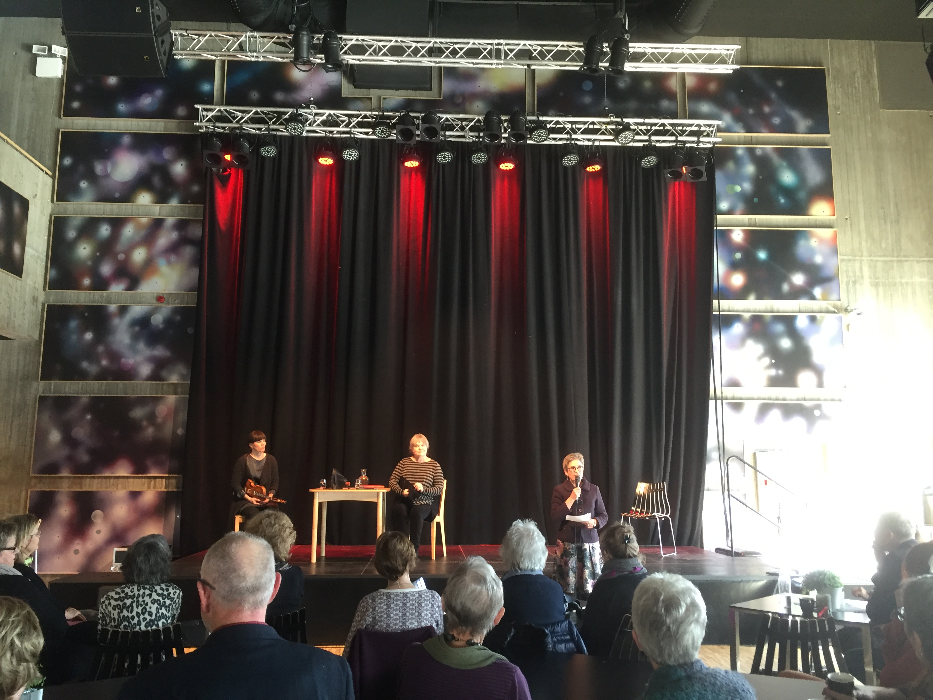 Skuespilleren Anne Marit Jakobsen og komponist/felespiller Benedicte Maurseth (t.v.) fremførte sin tolkning av Jon Fosse novellelignende fortelling "Morgon og kveld" - oppsatt på Nationaltheatret - under Herbjørnsruddagene 2016.